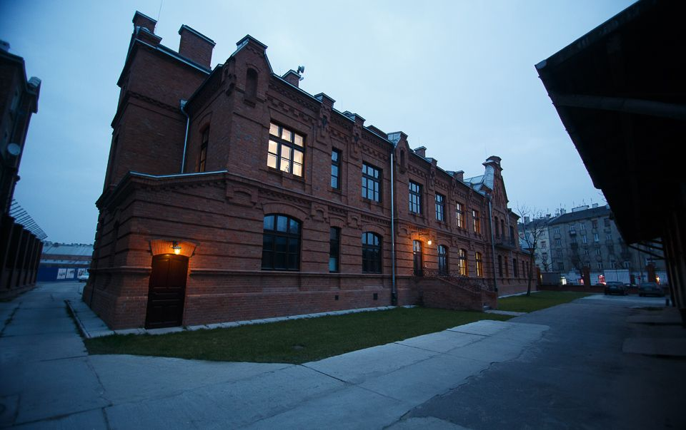 Centrum Praskie Koneser